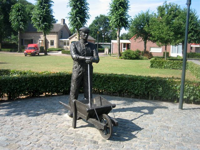 Beeld in het centrum van Landhorst